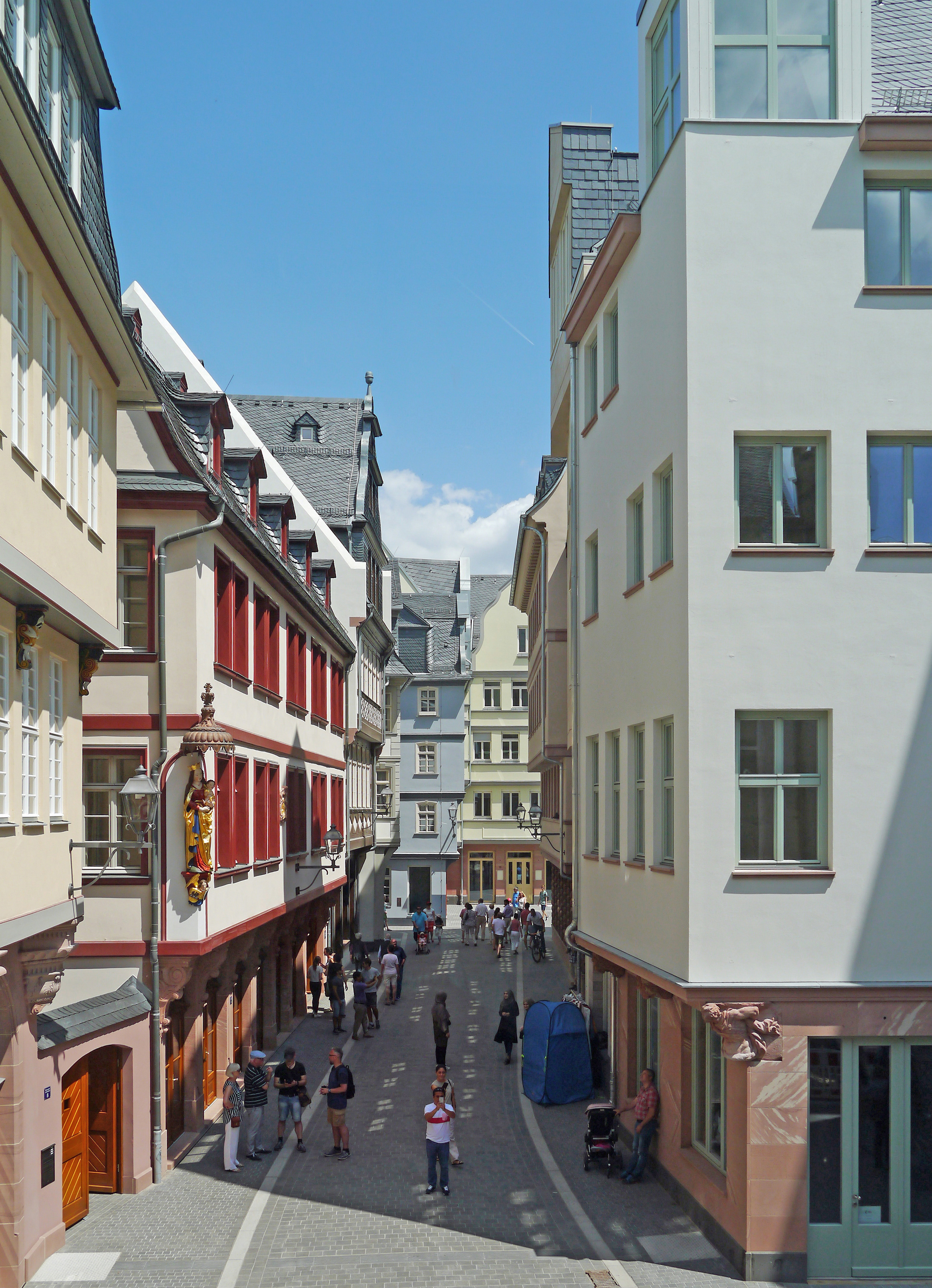 Straße Hinter dem Lämmchen, von West nach Ost. Dom-Römer-Projekt in der Frankfurter Altstadt im Juni 2018.